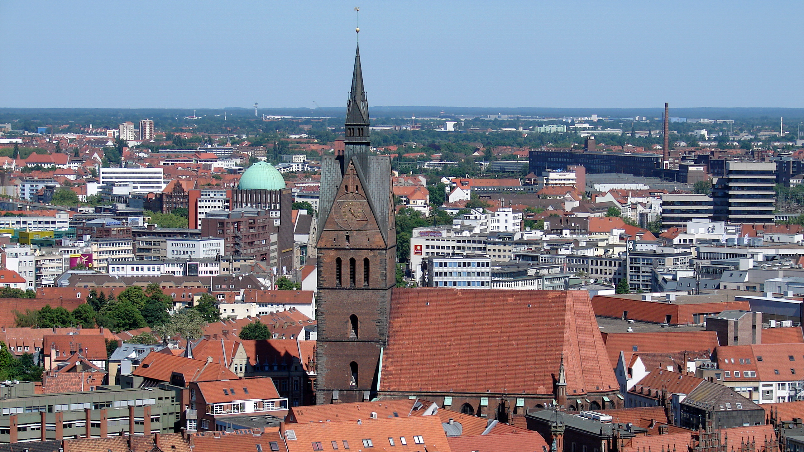 Marktkirche - Wahrzeichen von Hannover.